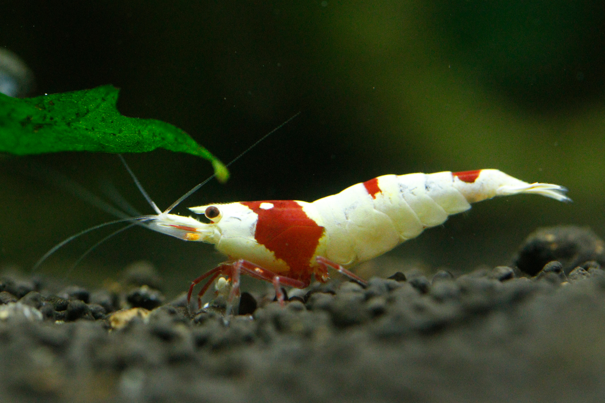 レッドビーシュリンプのオス2.2cm